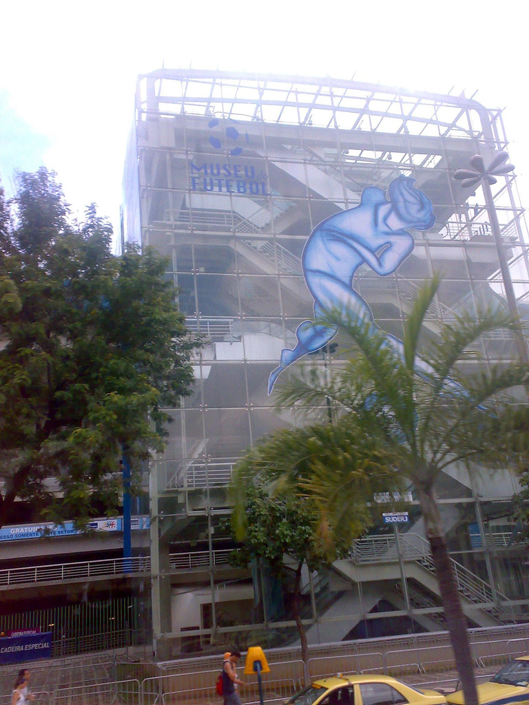 Museu do Futebol no Maracanã, Rio de Janeiro